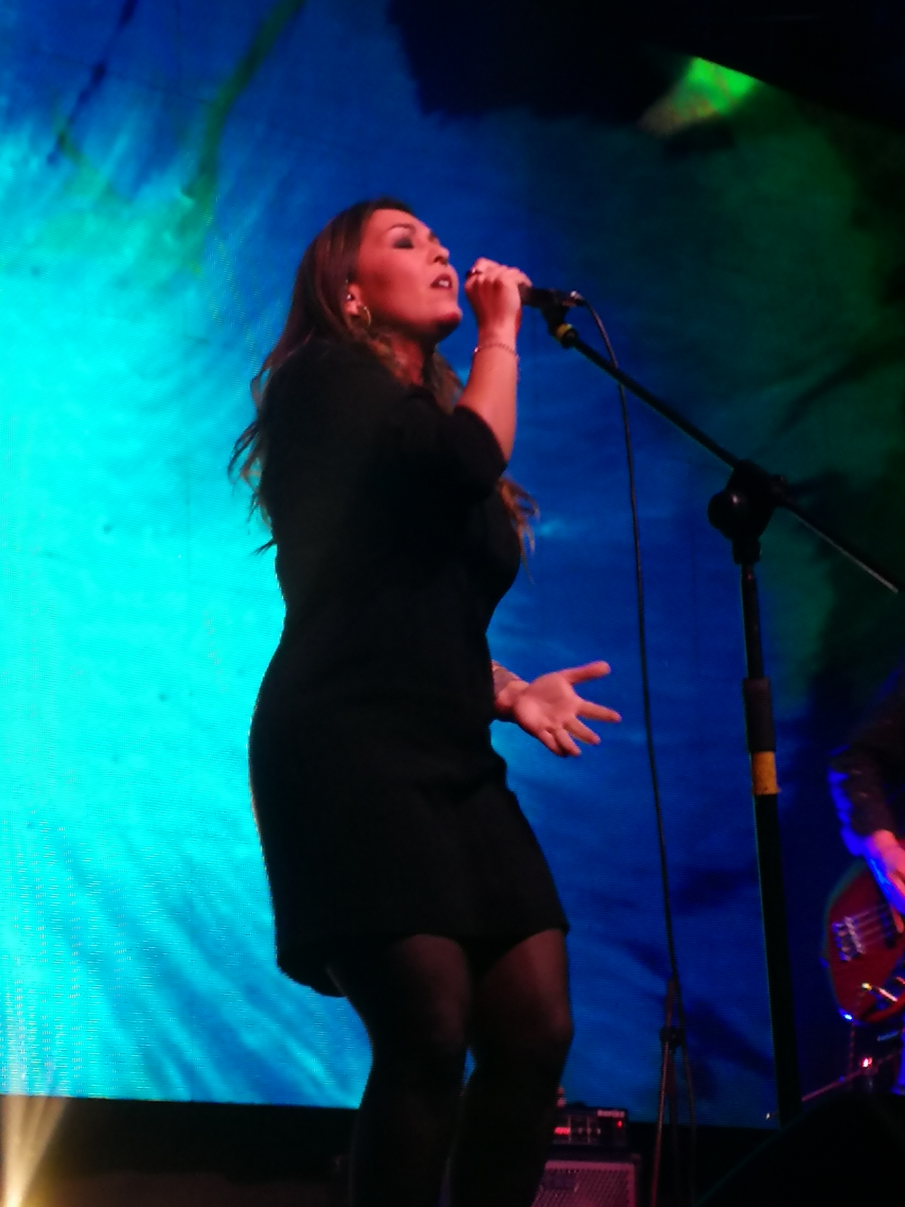 Saiko en el Club Amanda, Vitacura, Santiago de Chile - Agosto 2017, Lanzamiento álbum Lengua Muerta